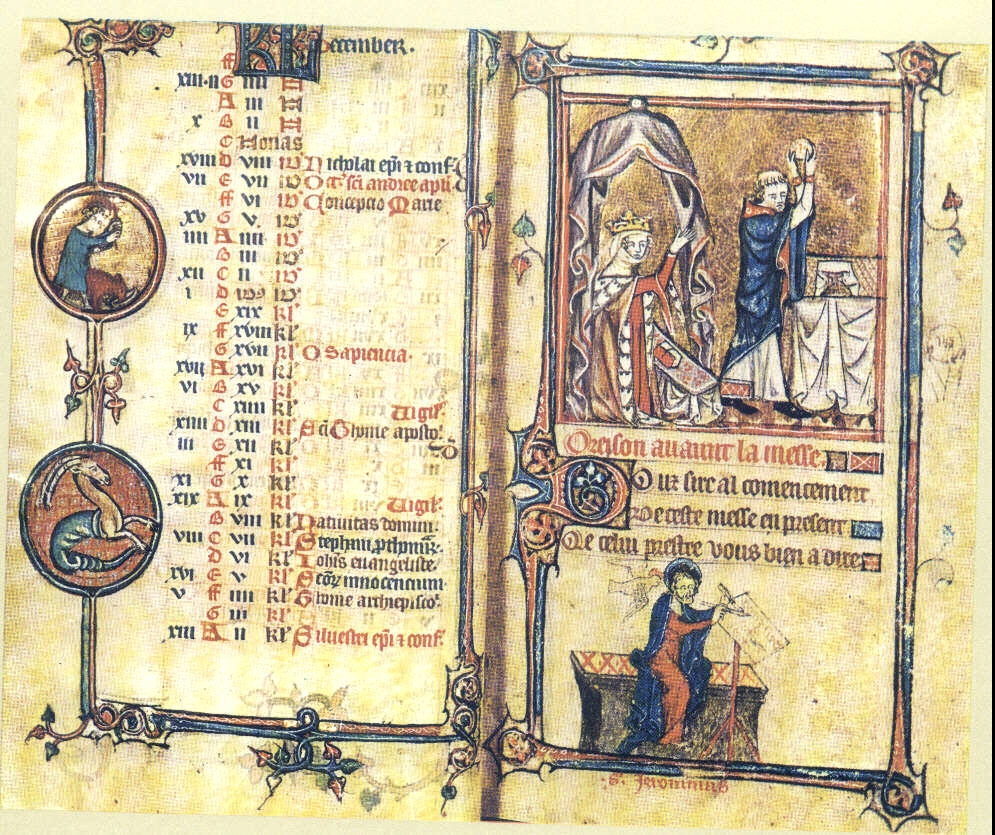 Abschluß des Kalendariums; Dame bei der Messe; Hieronymus in der Bordüre, aus dem Stundenbuch von Taymouth, Miniaturen im Stile von Pucelle gemalt, 1325-1340